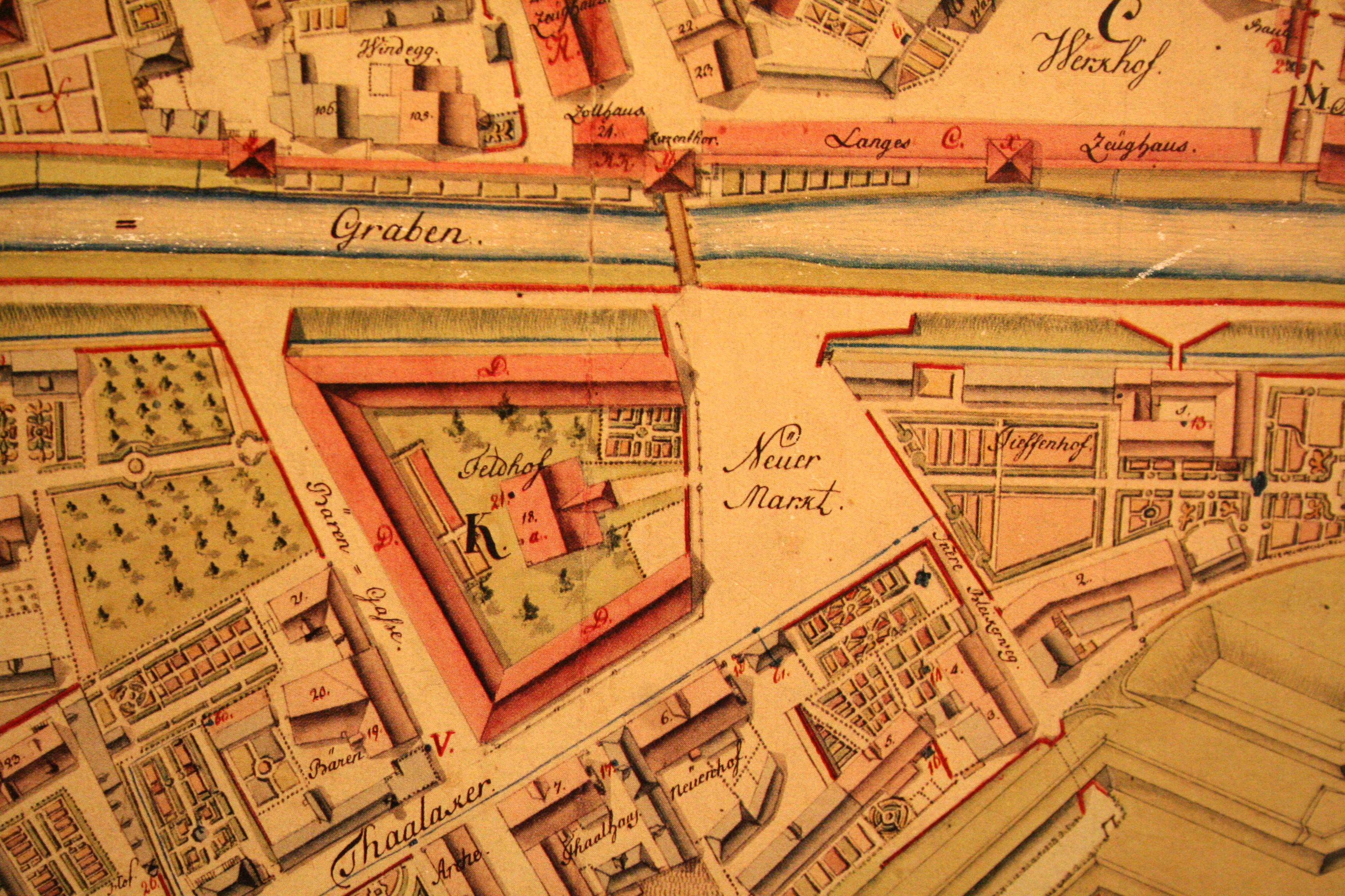 Der Paradeplatz auf dem Müllerplan von 1793